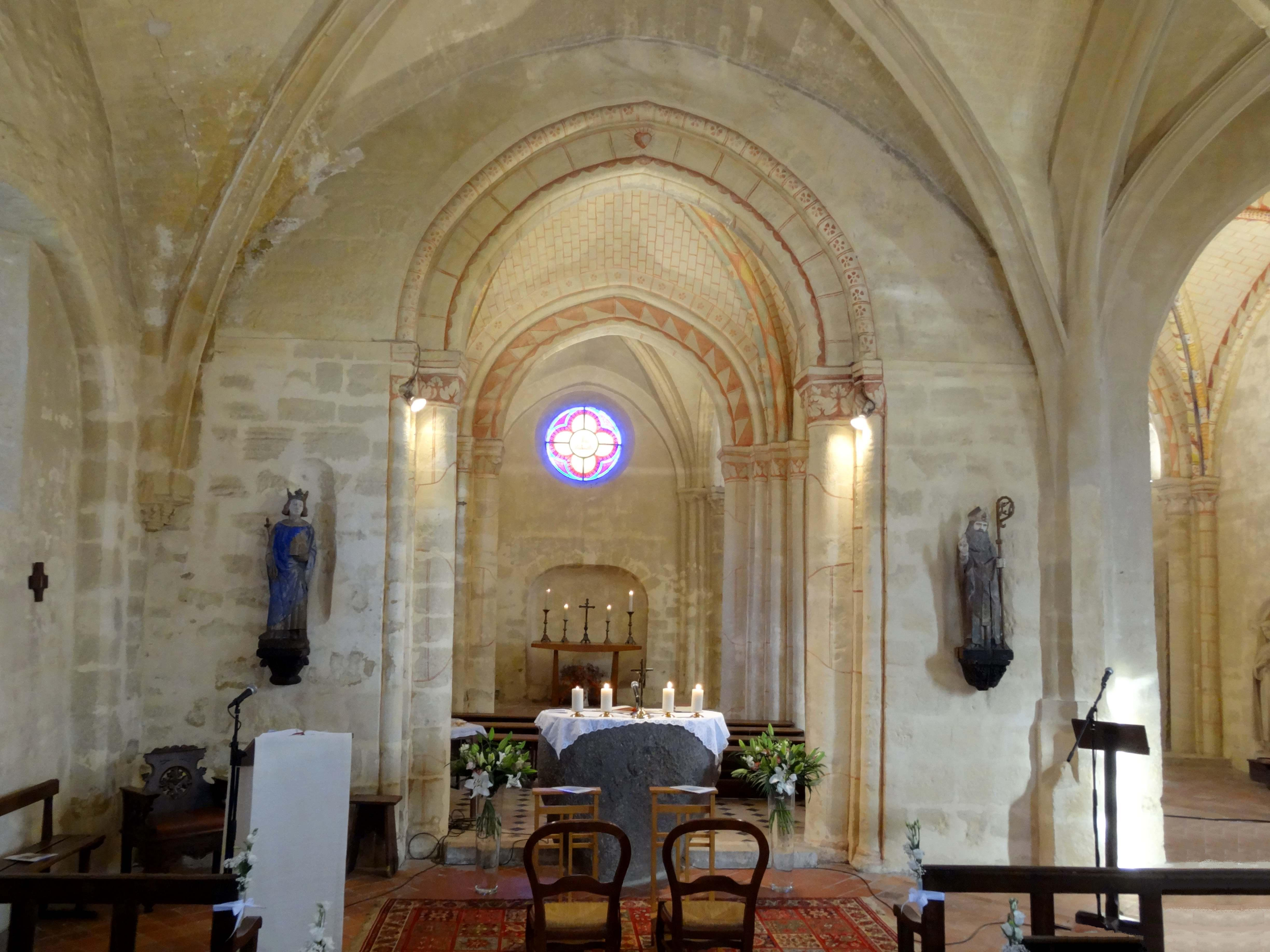 Intérieur de l'église - voir titre.